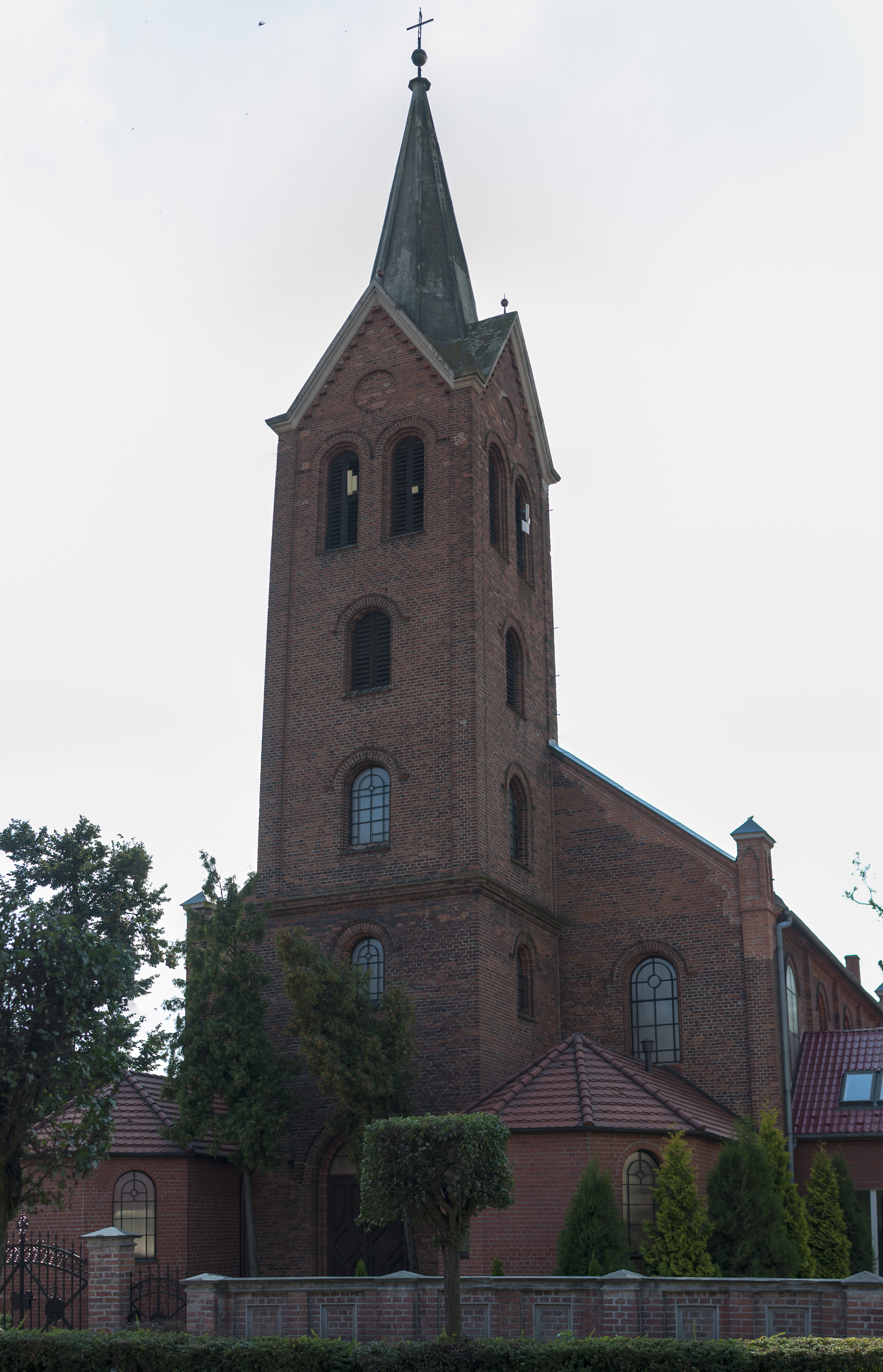 kościół ewangelicki (obecnie szkoła) z lat 1862-1863, cmentarz kościelny, ogrodzenie murowane Jutrosin, ul. Wrocławska 29, Jutrosin